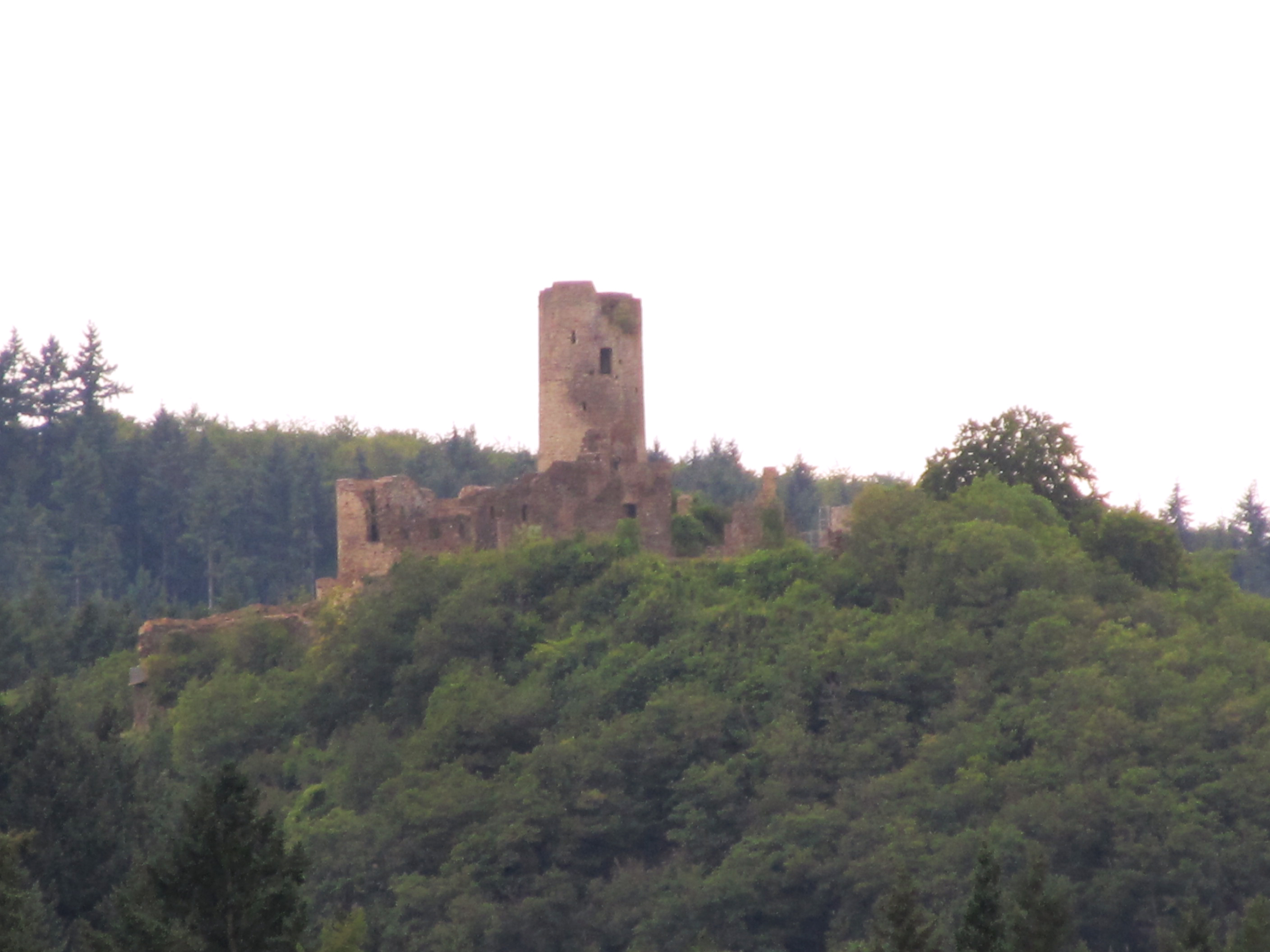 Ruine Winneburg